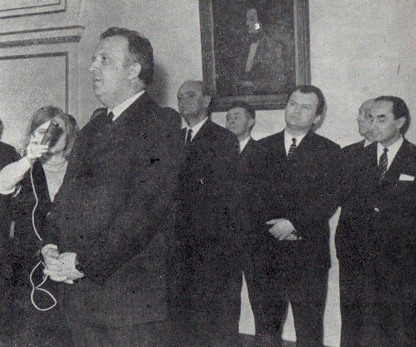 25-lecie Głosu Wielkopolskiego - 16 lutego 1970, Poznań. Przemawia Stefan Olszowski. Pierwszy z prawej - Wincenty Kraśko.